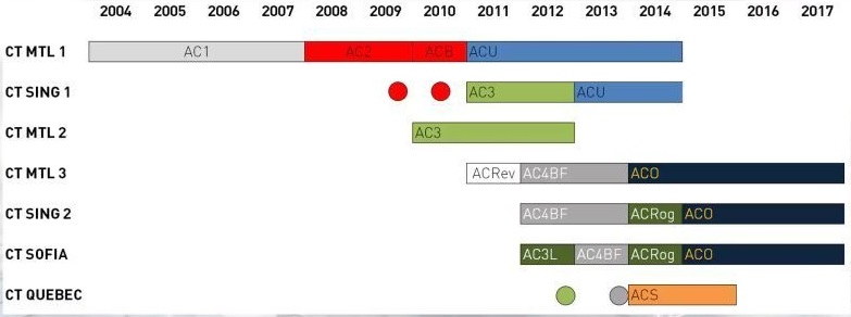 Диаграмма разработки игр серии Assassin's Creed c 2007 по 2017 годы.